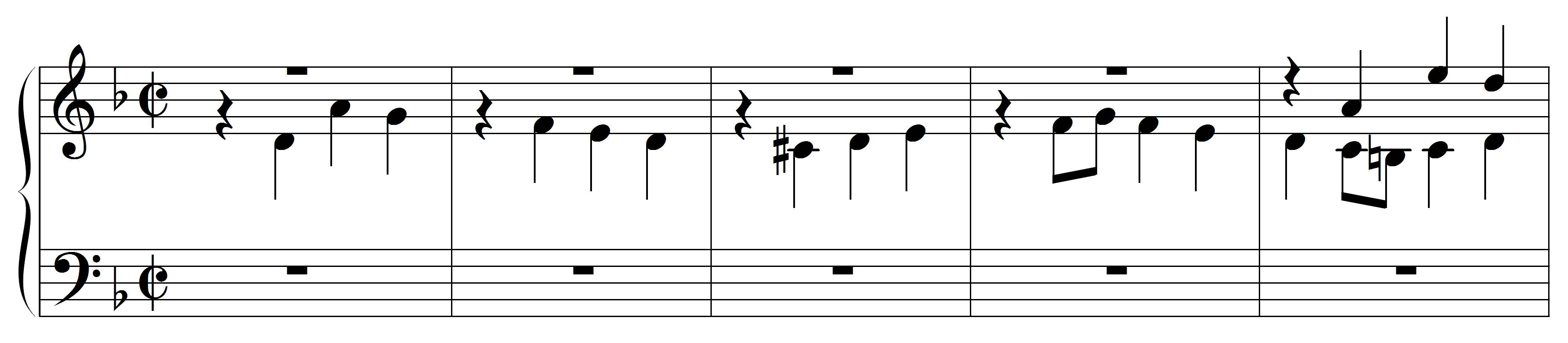 Bach, JS, Incipit Contrapunctus 11, BWV 1080